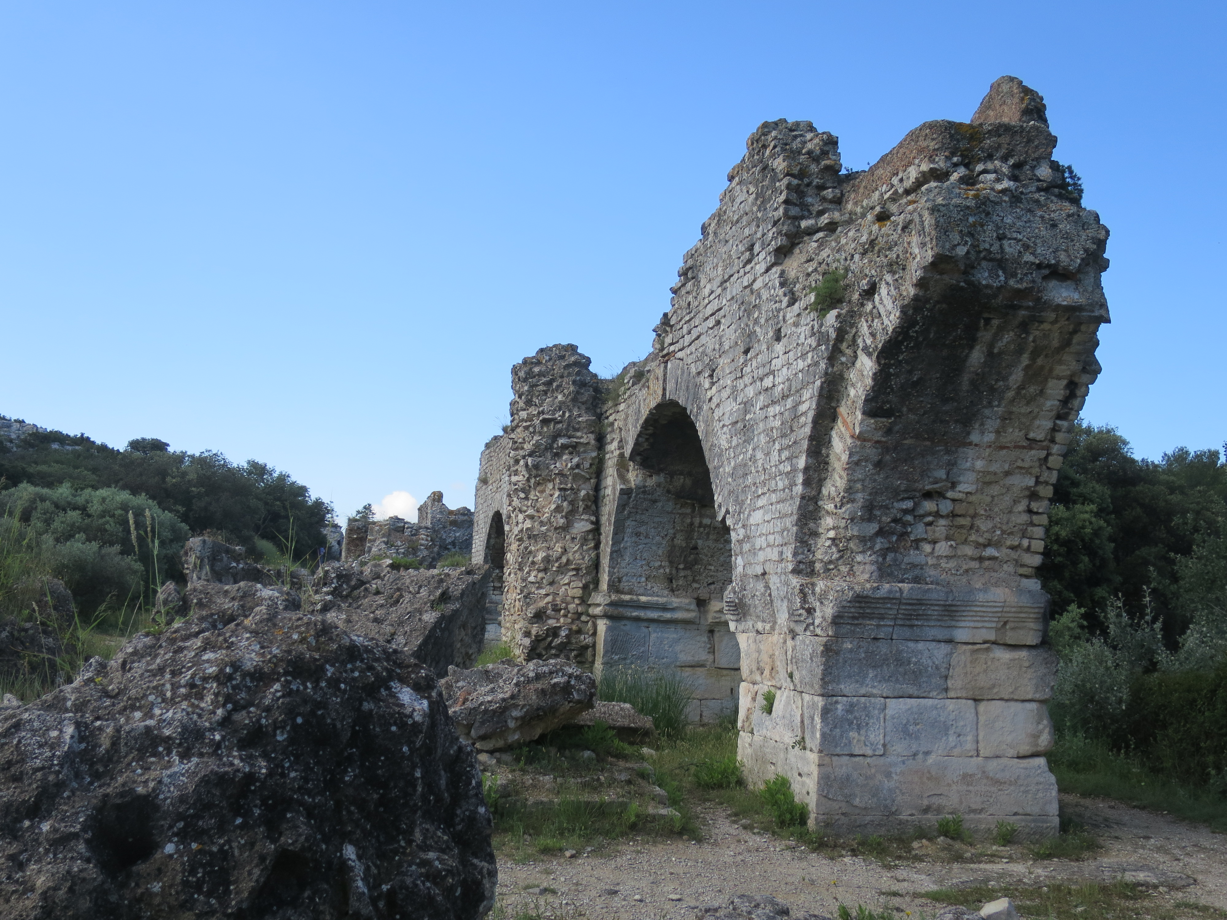 Aquädukt Alpilles—Arles bei der römischen Mühle von Barbegal